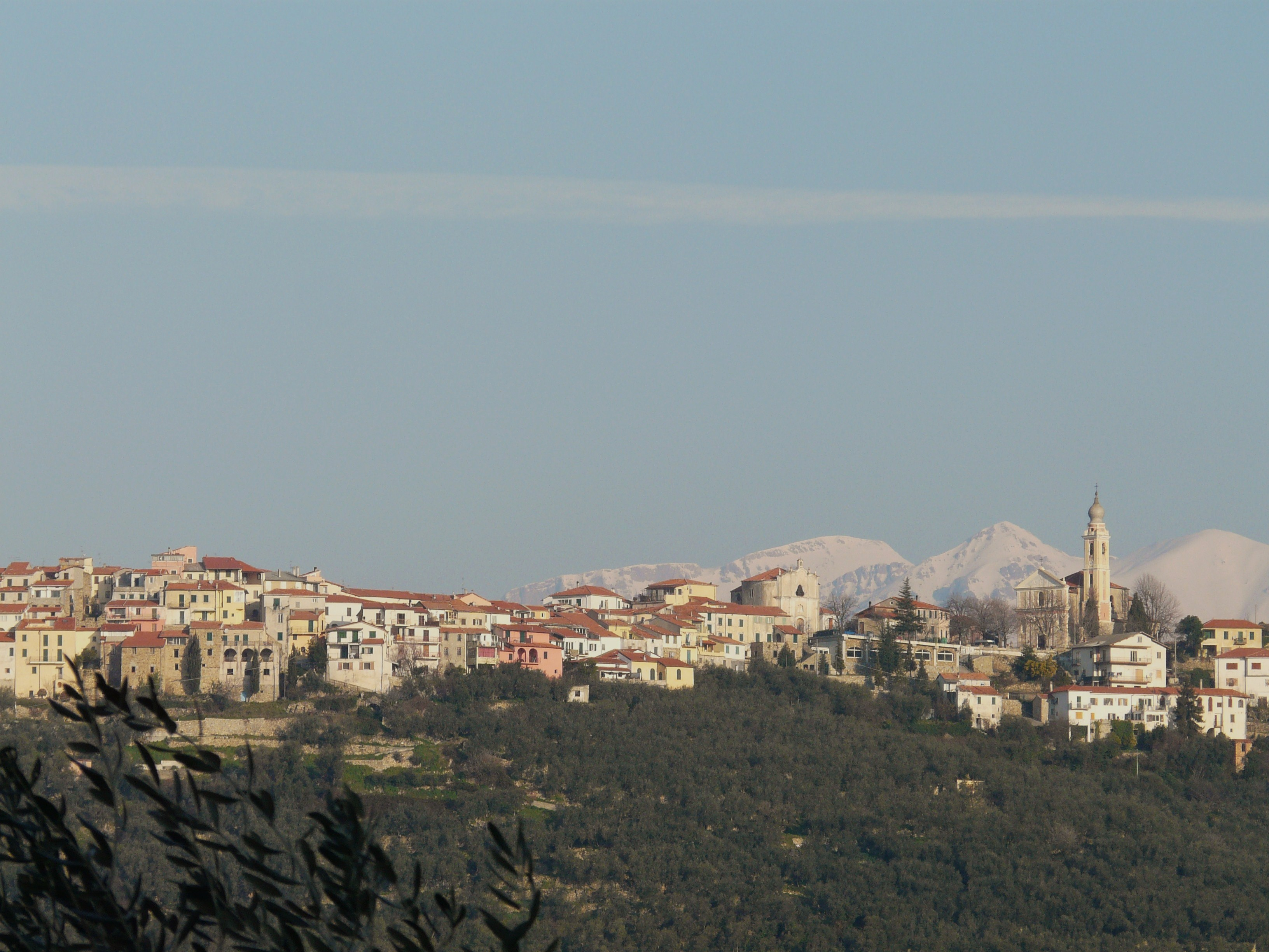 Panorama della frazione di Torria, Chiusanico, Liguria, Italia